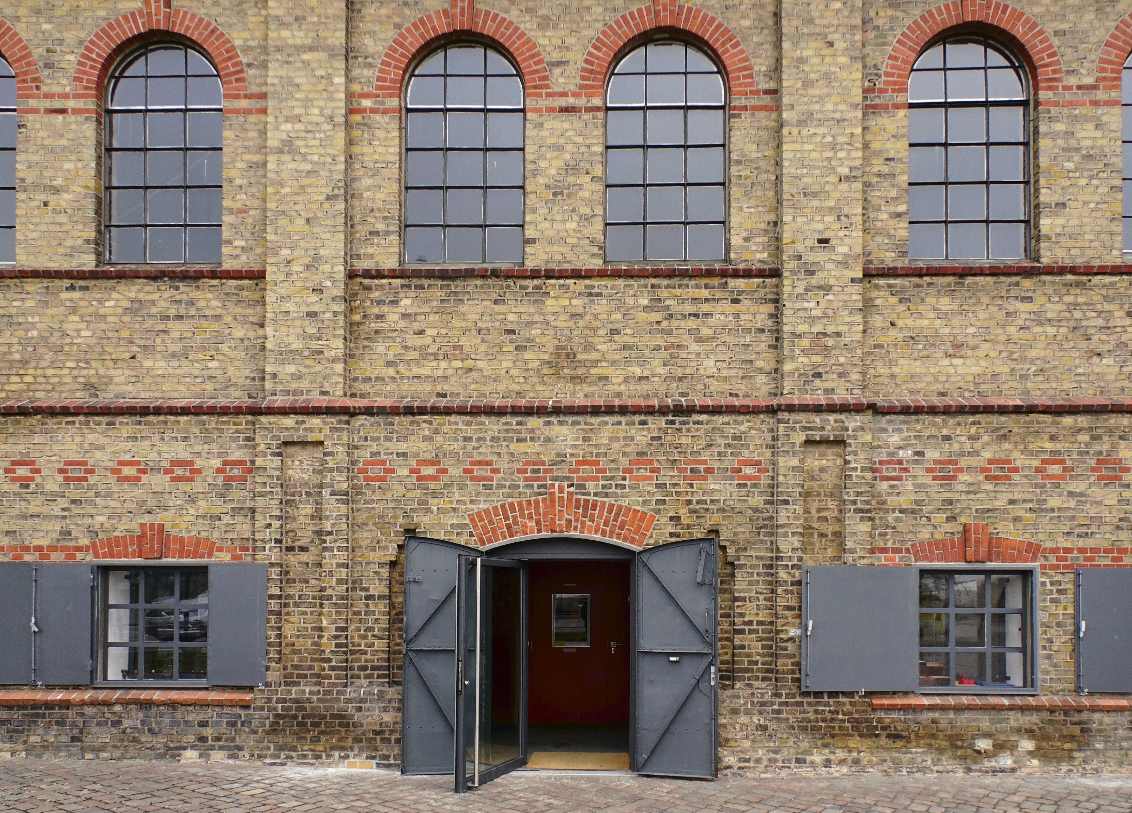 Alte Metallgiesserei Kiel, Eingang